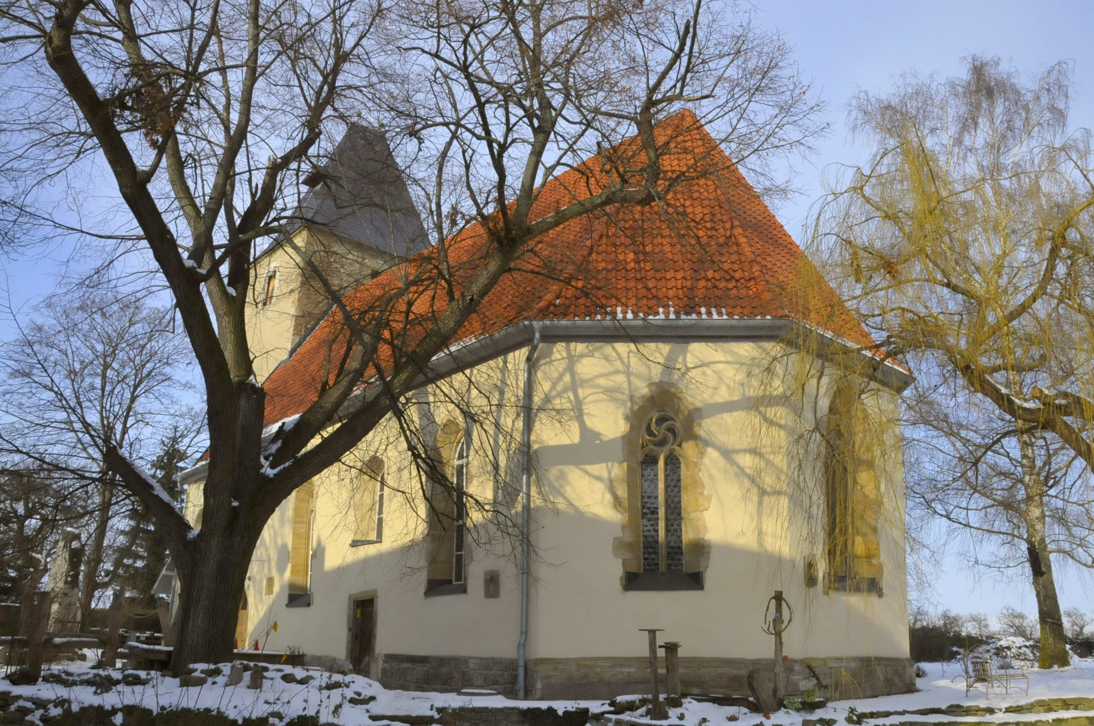 Dorfkirche St. Viti in Großballhausen